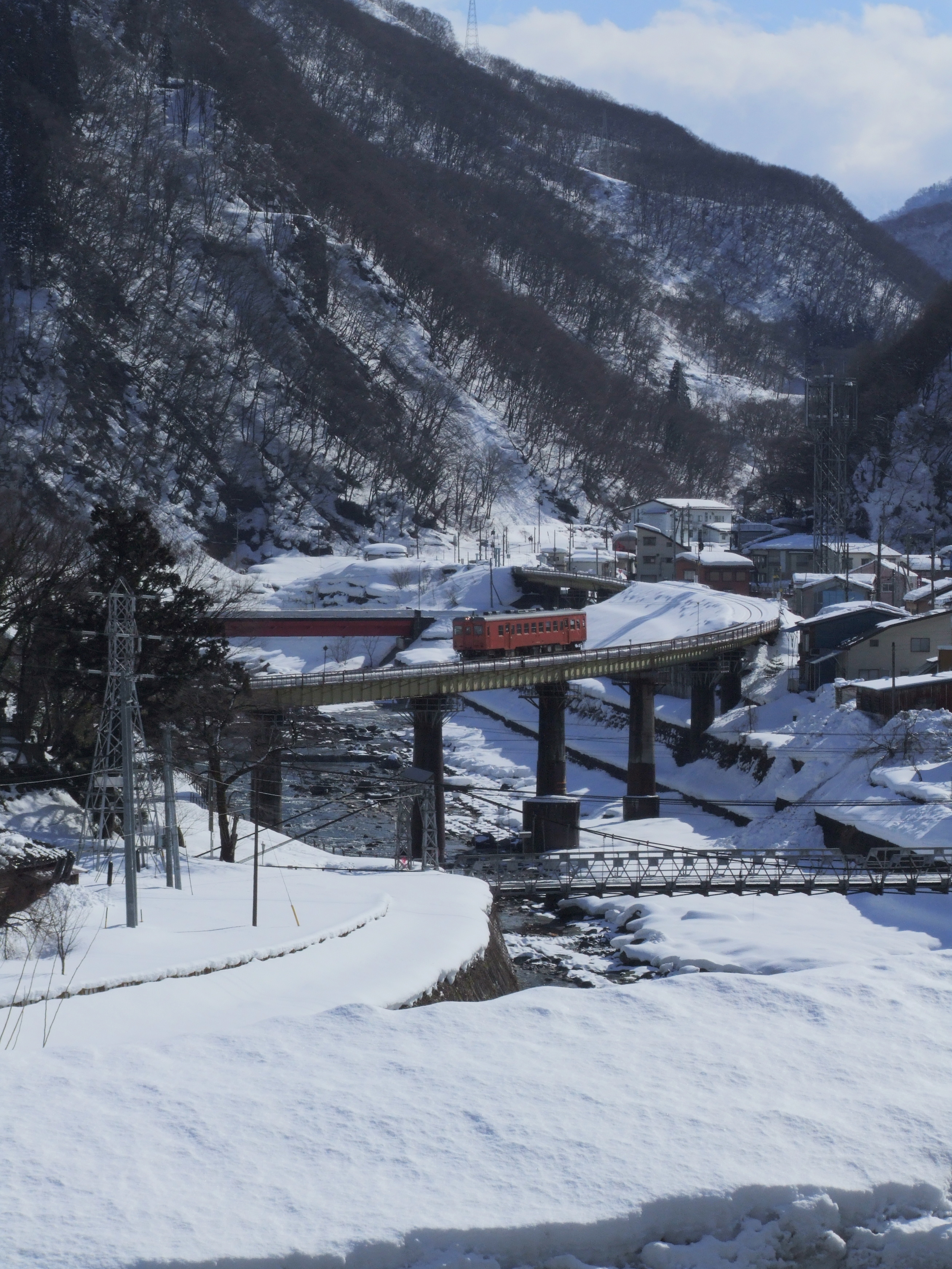 平岩駅俯瞰